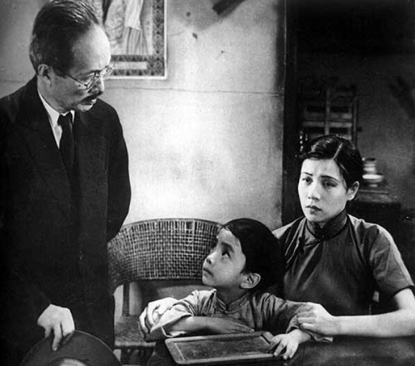 粵語: 1934年電影《神女》劇照。左起分別係唐槐秋、黎鏗、阮玲玉。